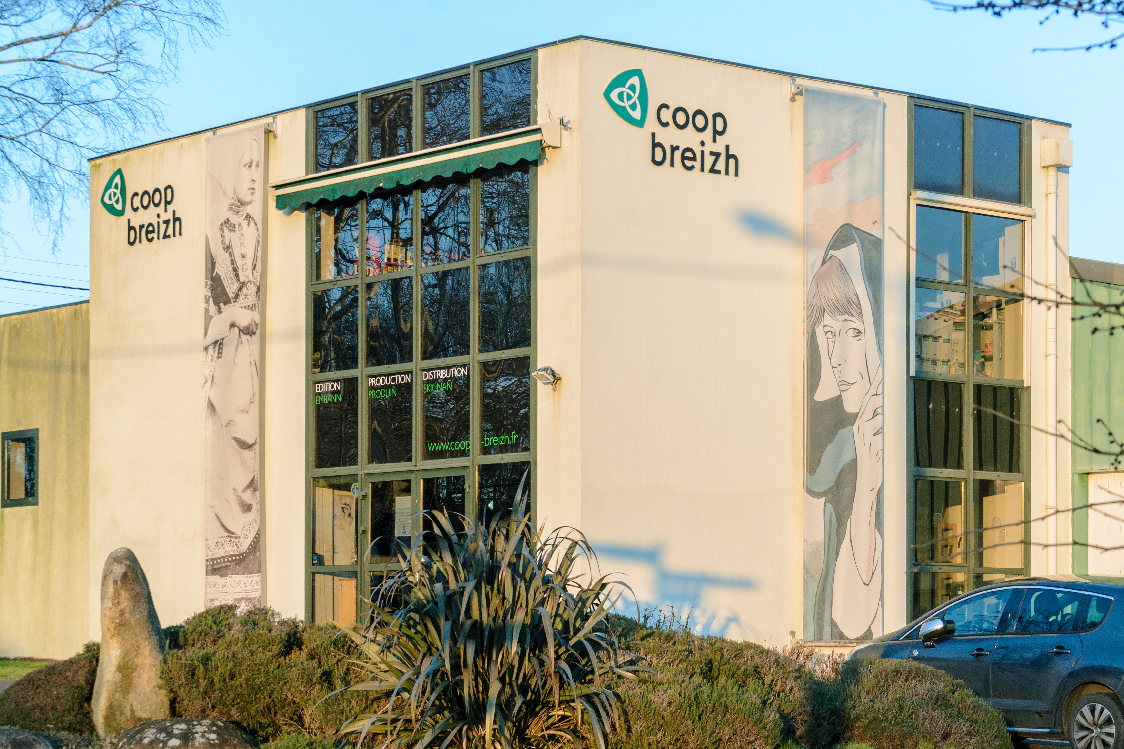 Siège de l'entreprise culturelle bretonne Coop Breizh, ZA Kerangwenn à Spézet (Finistère).